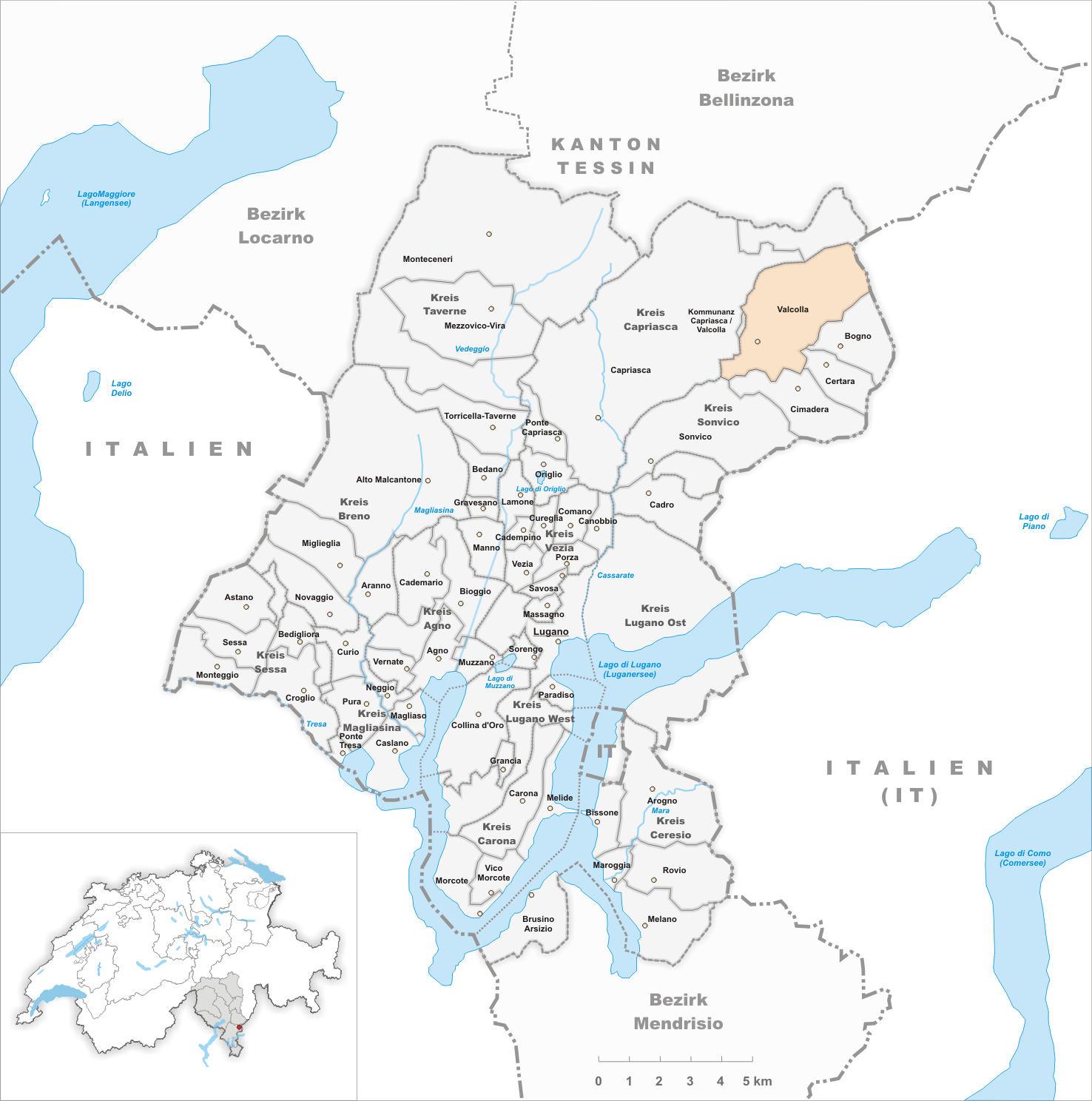 Municipality Valcolla